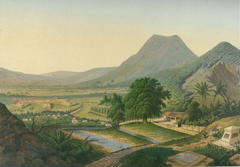 Litho. Litho naar een oorspronkelijke tekening van F.C. Wilsen. Pagina 6 van de map "De Indische Archipel", Den Haag, 1865-1876, met daarin 24 kleurenlitho's, van objectnr. 3728-430 t/m 3728-479.. Het fort Willem I met een begraafplaats op de voorgrond.